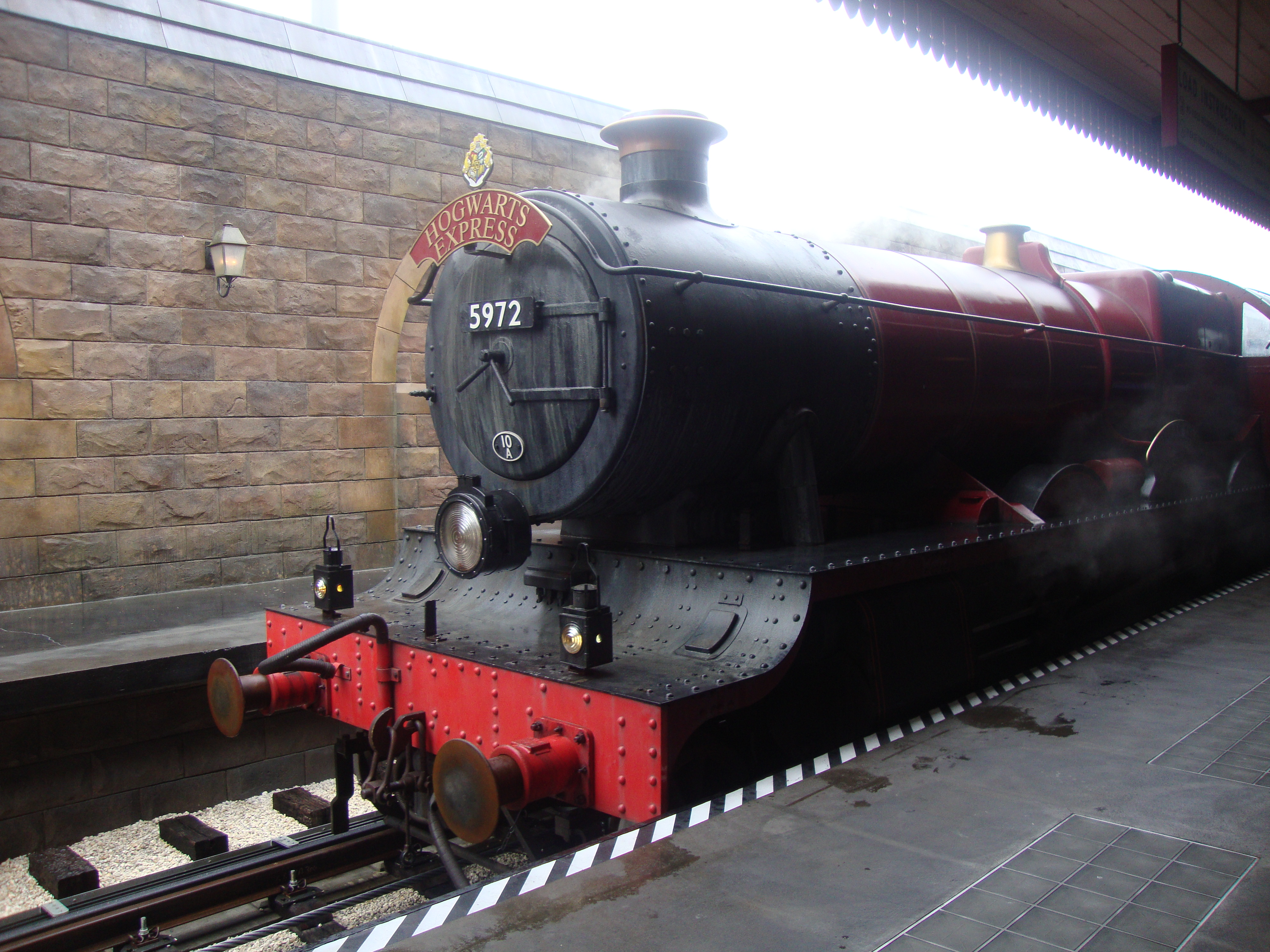 Universal Studios